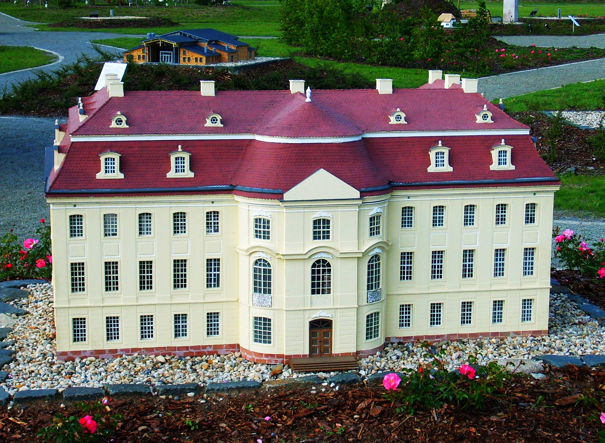 Modell vom Schloss Martinskirchen im Miniaturenpark Elsterwerda